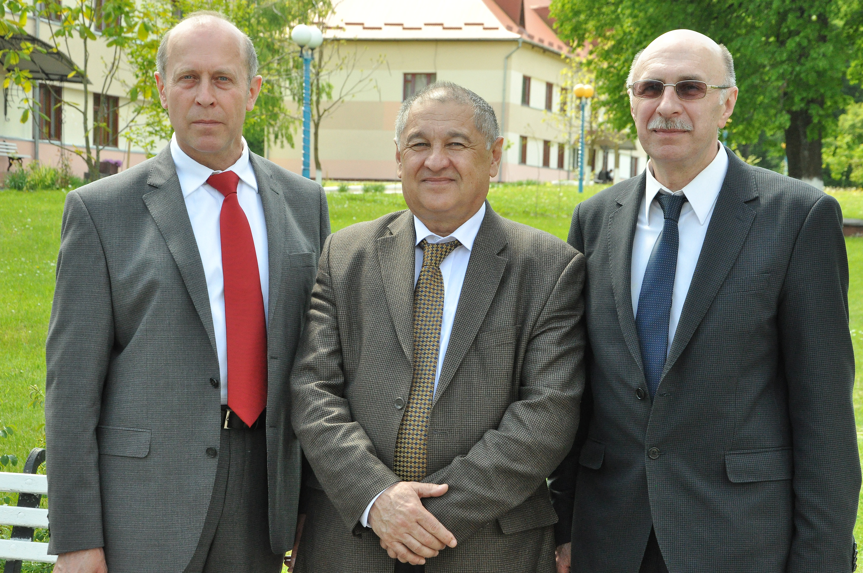 Професори Степан Вадзюк, Ігор Дейкало, Ігор Галайчук на XIII Всеукраїнській науково-практичній конференції з міжнародною участю «Актуальні питання якості медичної освіти», що відбулася 12-13 травня 2016 року в НОК «Червона калина» Тернопільського державного медичного університету імені І. Я. Горбачевського.